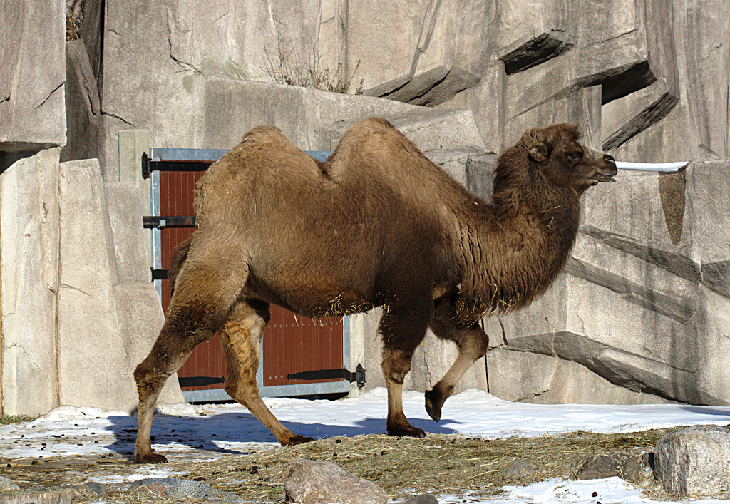 Bactrian Camel